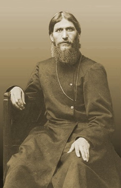 Rasputin